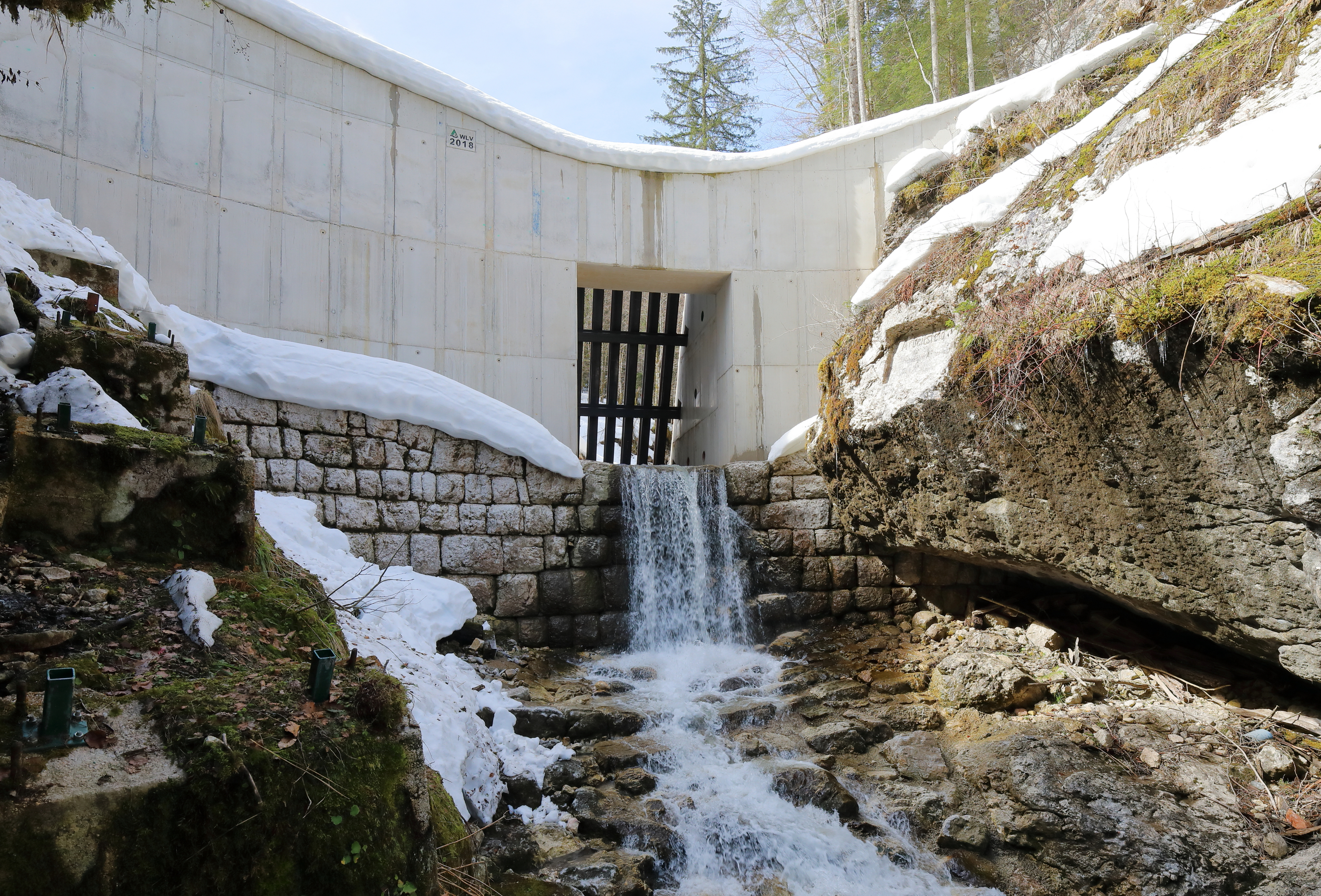 Geröllsperre des Mühlbaches nächst dem Rudolfsturm in der oberösterreichischen Marktgemeinde Hallstatt.Ursprünglich wurde die Geschiebe-Rückhaltesperre 1885 errichtet und zu Ehren von Ackerbauminister Julius Graf Falkenhayn als „Falkenhayn-Sperre“ bezeichnet. Nachdem der Mühlbach am 18. Juni 2013 nach einem Starkregen den Ort Hallstatt zum Teil schwer verwüstete, wurde von der Wildbach- und Lawinenverbauung um rund 5 Mio. Euro die alten Verbauungen saniert bzw. erweitert. In diesem Zuge wurde auch die„Falkenhayn-Sperre“ massiv verstärkt (Fertigstellung 2018). Die neu errichtete Krone hat eine Länge von 38,00 m im Bogen, eine Höhe von 9,50 m im Bereich der Überfallssektion und die Ausnehmung ist 5,90 m mal 3,90 m groß.